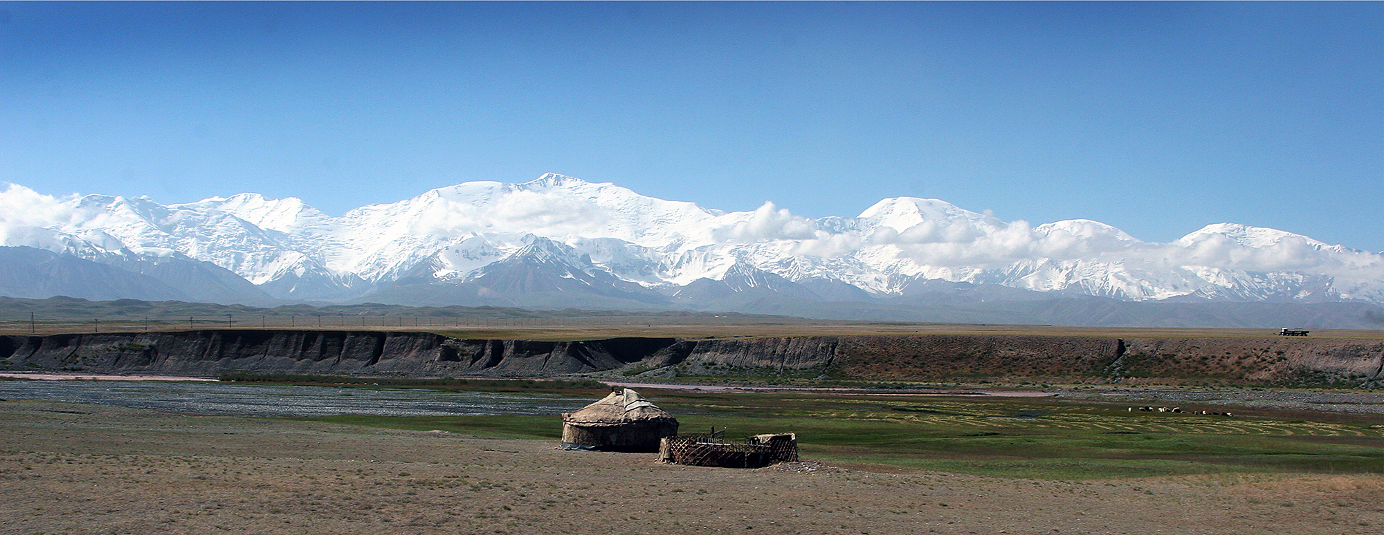 Lenini mägi Taga-Alai ahelikus 05